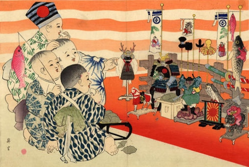 山本昇雲画「子供遊び」（明治39年･1906年）より 屋内に飾られるようになった武者幟のいろいろ